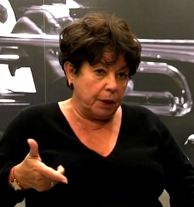 Réalisatrice et productrice Française.